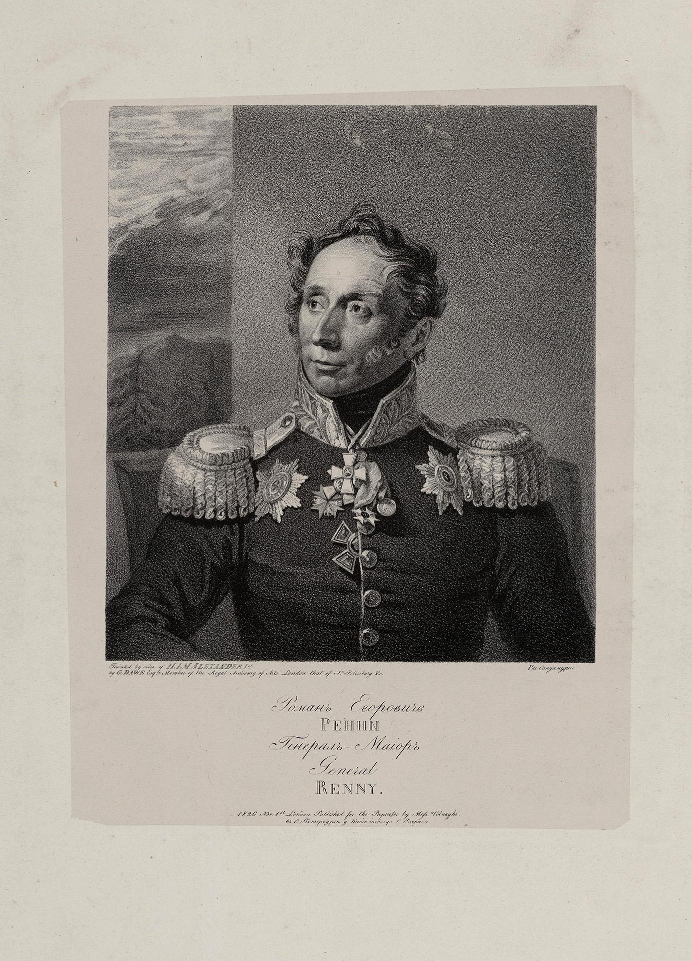 Портрет генерала Р.Е. Ренни